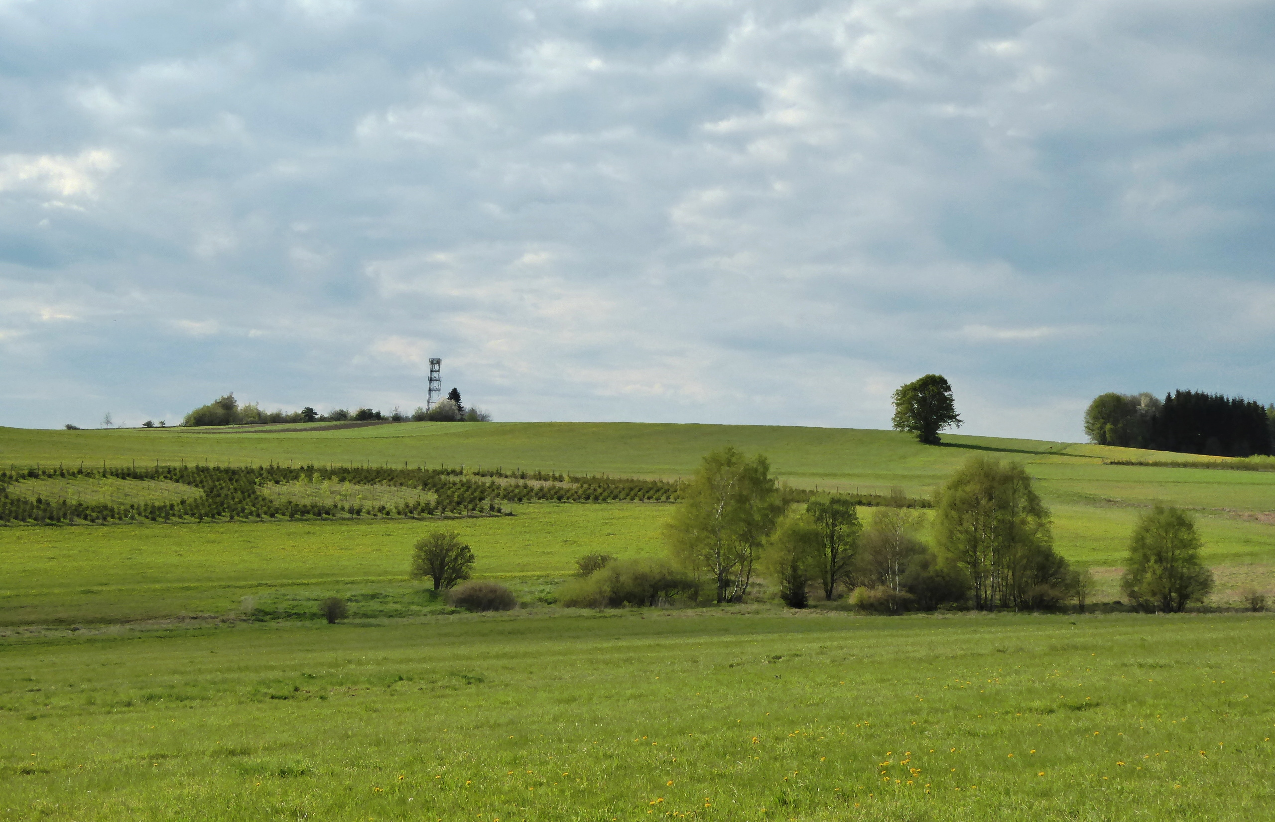 Pešava s vrcholem 697 m n.m. severozápadně od Kameniček na katastrálním území Jeníkova byla uváděna Zeměpisným lexikonem České republiky vydaným v roce 1987 bývalým Geografickým ústavem Československé akademie věd jako nejvyšší bod Železných hor. V roce 2006 vydala Agentura ochrany přírody a krajiny v Brně 2. vydání Zeměpisného lexikonu ČR, kde je vrchol prezentován jako významný bod Kameničské vrchoviny a za nejvyšší, po upřesnění hranic geomorfologických jednotek Česka za pomocí digitálních technologií, je označován vrchol U oběšeného (737 m n.m.) severozápadně od Svratouchu nad Filipovským pramenem řeky Chrudimky.